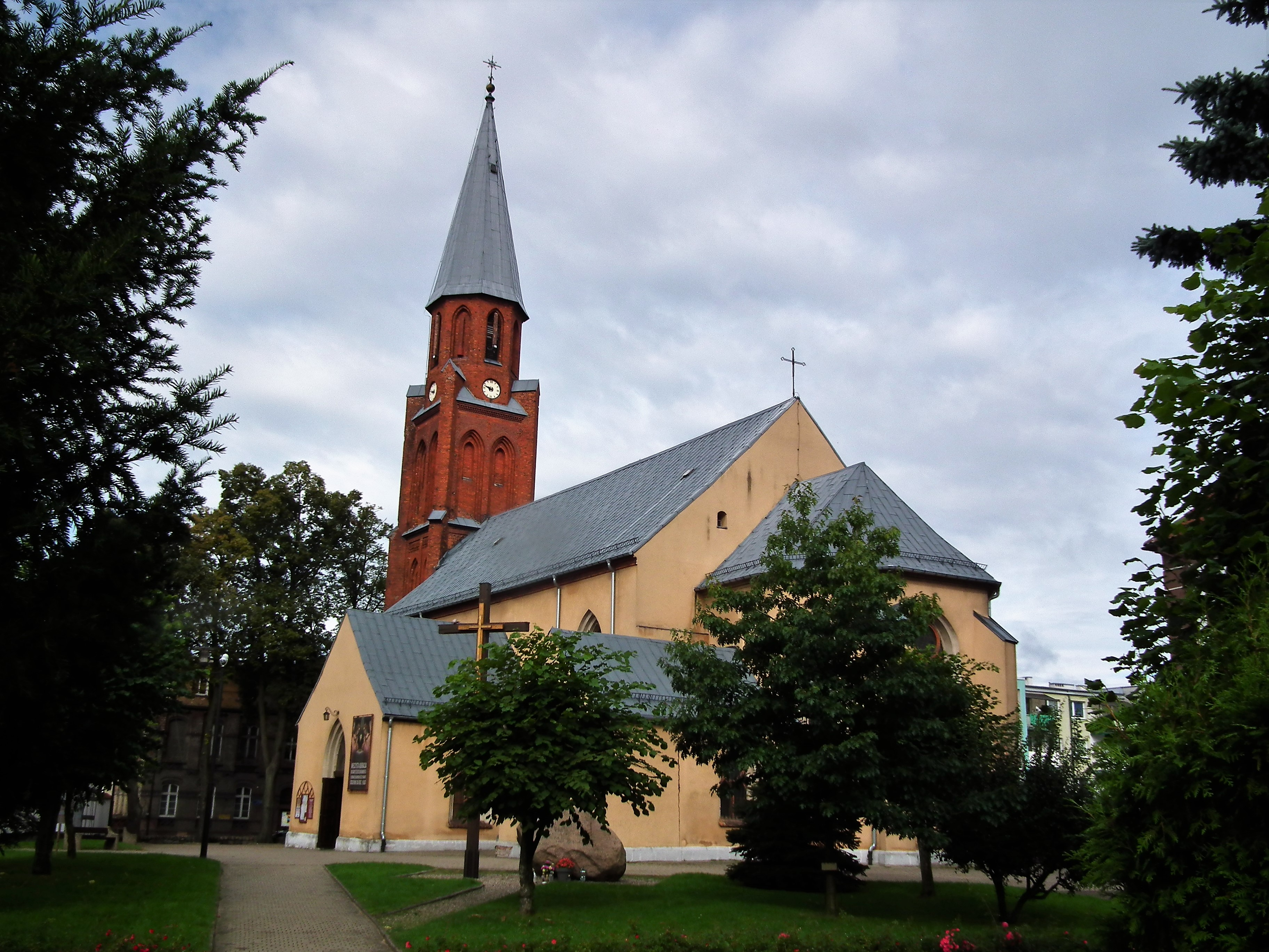 Kościół Wniebowzięcia Najświętszej Maryi Panny w Złocieńcu.